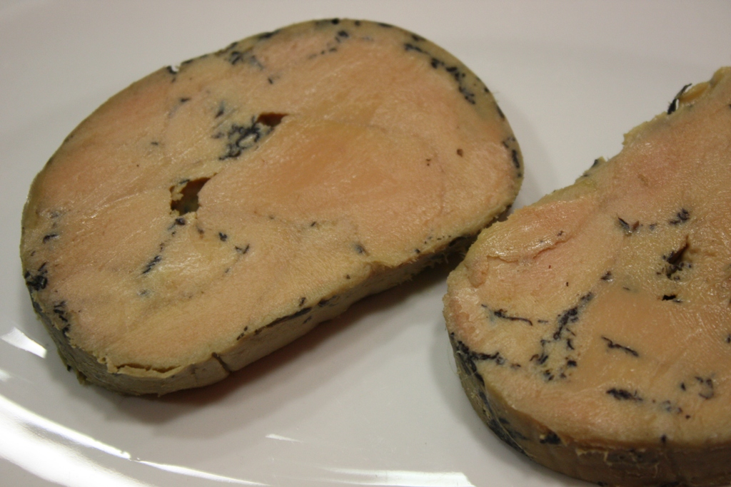 Bloc de foie gras truffé